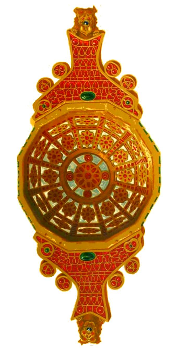 Vasul dodecagonal - reproducere Alexandru Odobescu